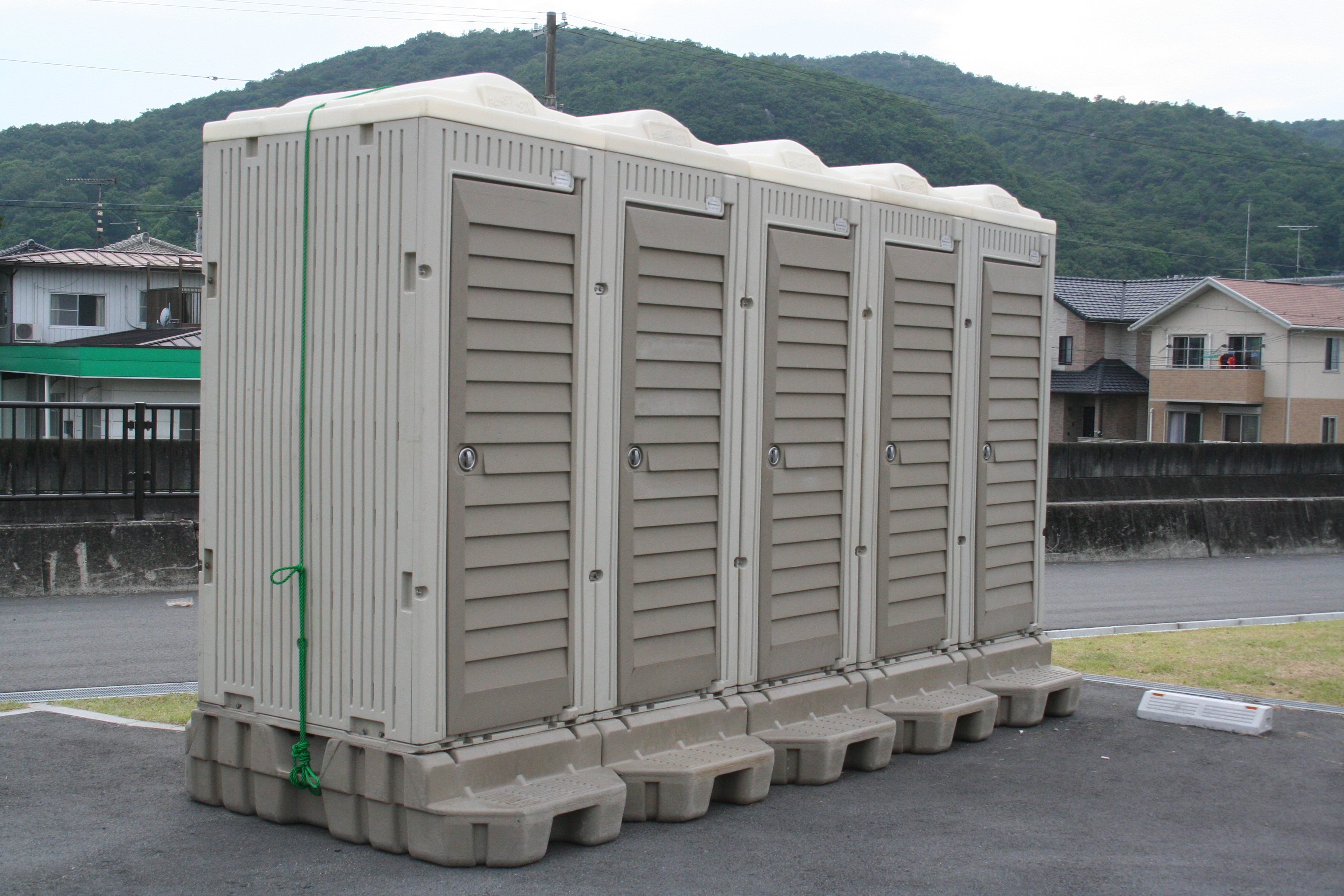 仮設トイレ。正面側。